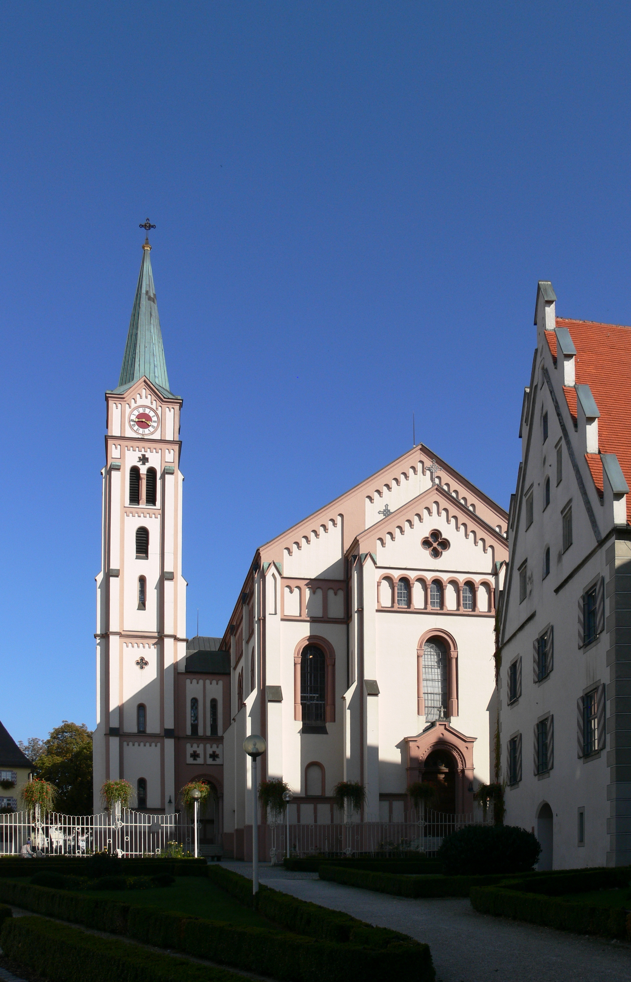 Weißenhorn (Landkreis Neu-Ulm), Stadtpfarrkirche Mariä Himmelfahrt